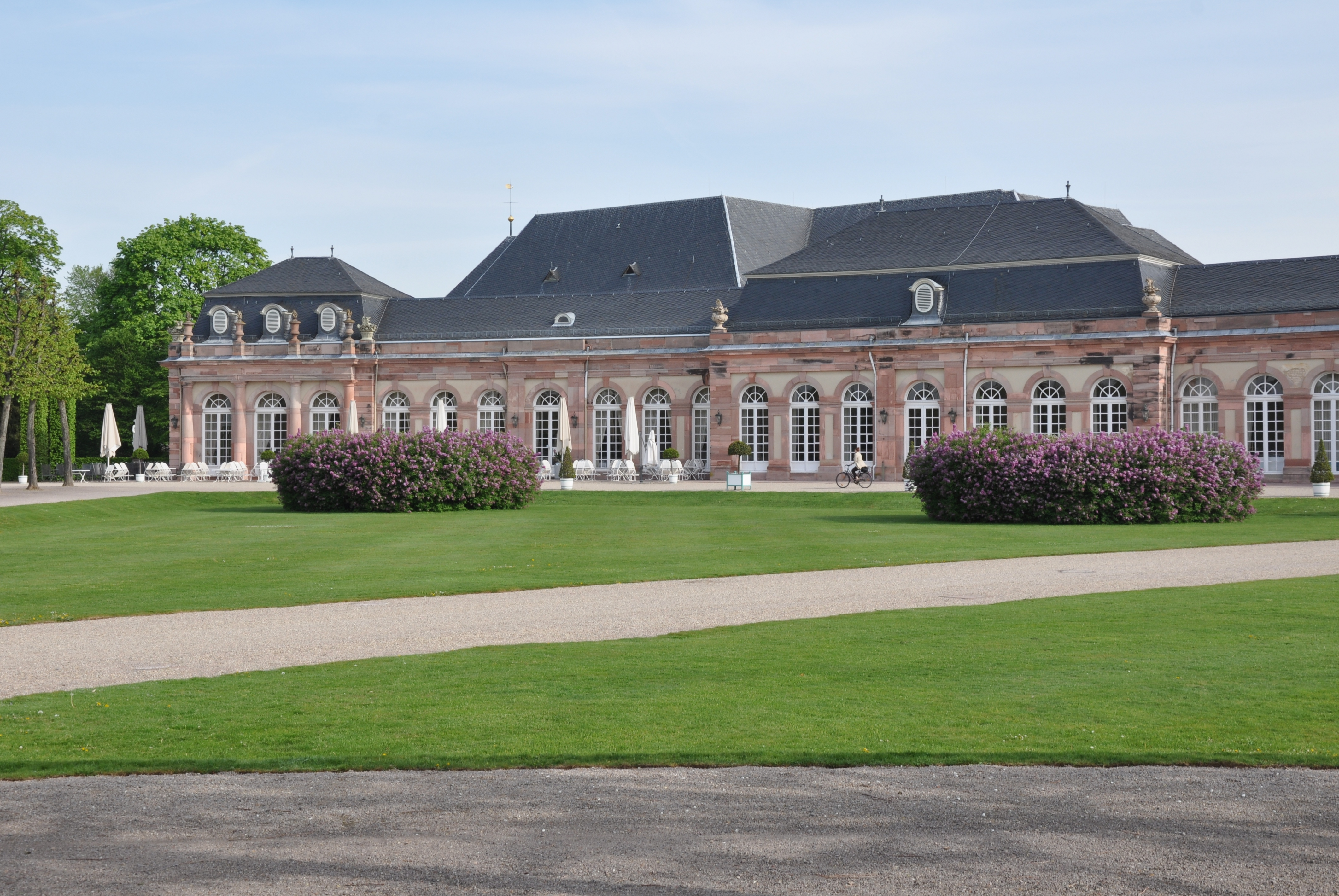 Schlossgarten Schwetzingen